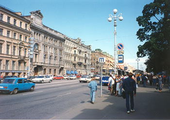 San Pietroburgo - Prospettiva Nevsky